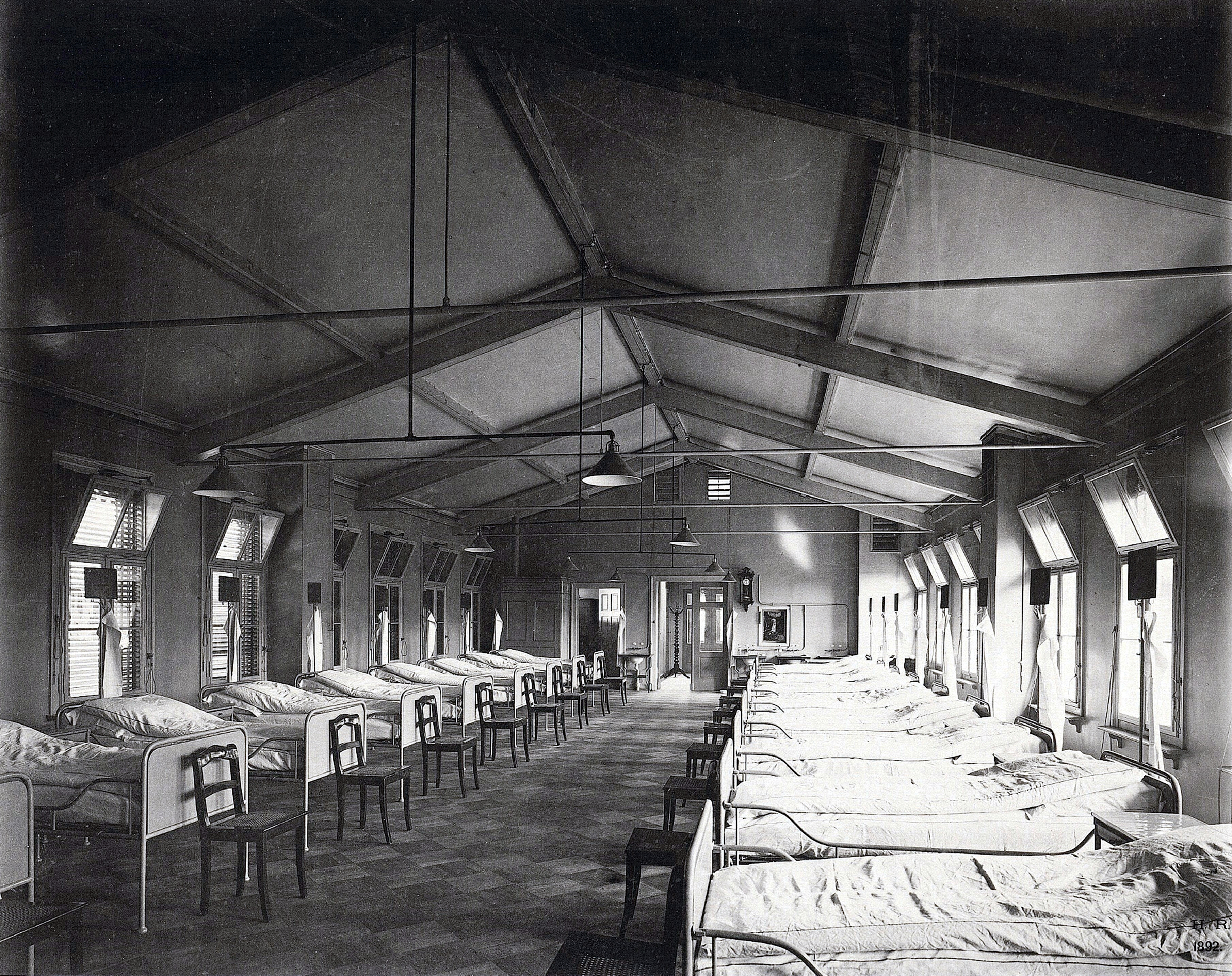 Charité, Krankensaal im Institut für Infektionskrankheiten